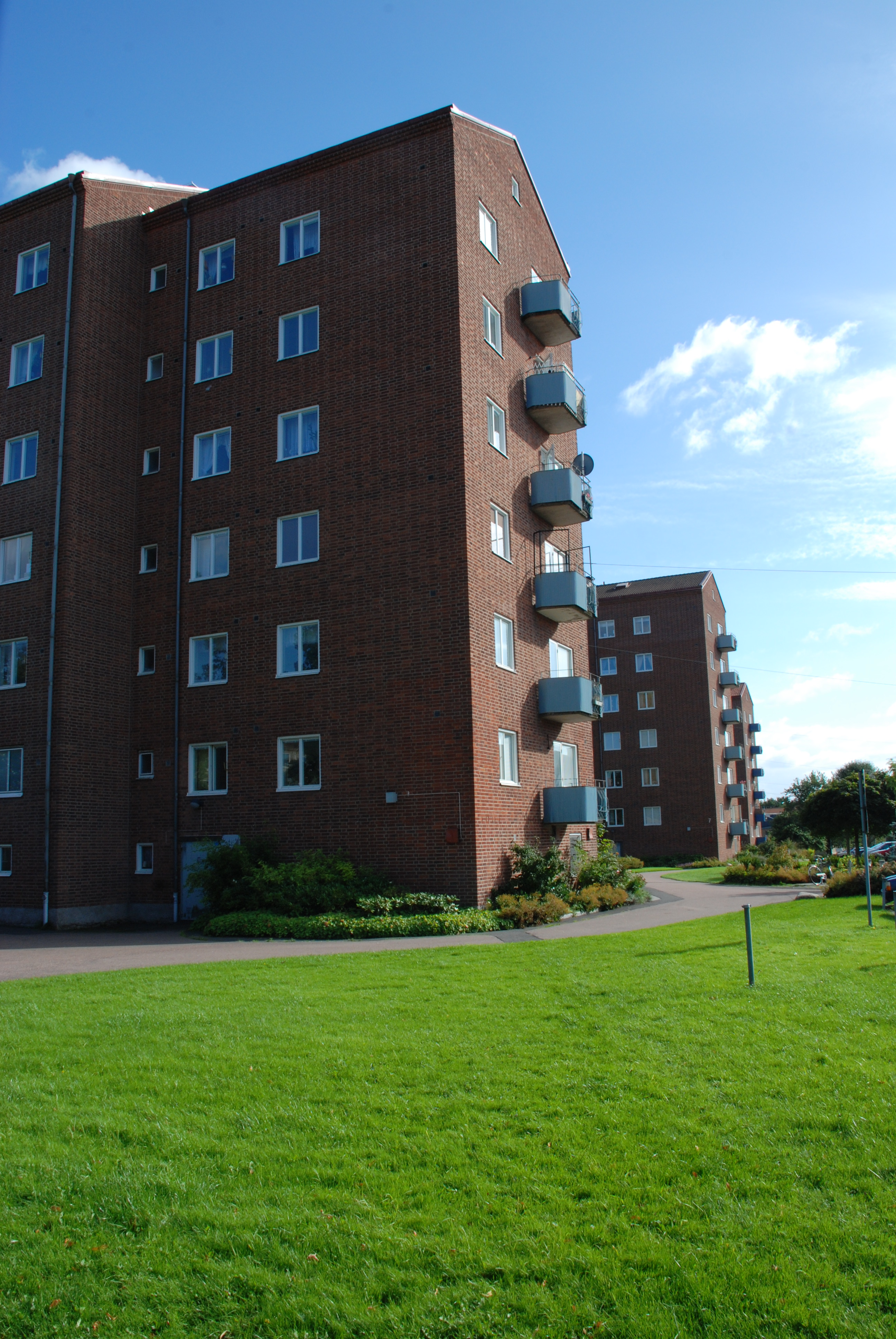 Bostadshuset Eketrägatan 9 i stadsdelen Kyrkbyn på Hisingen i Göteborg.